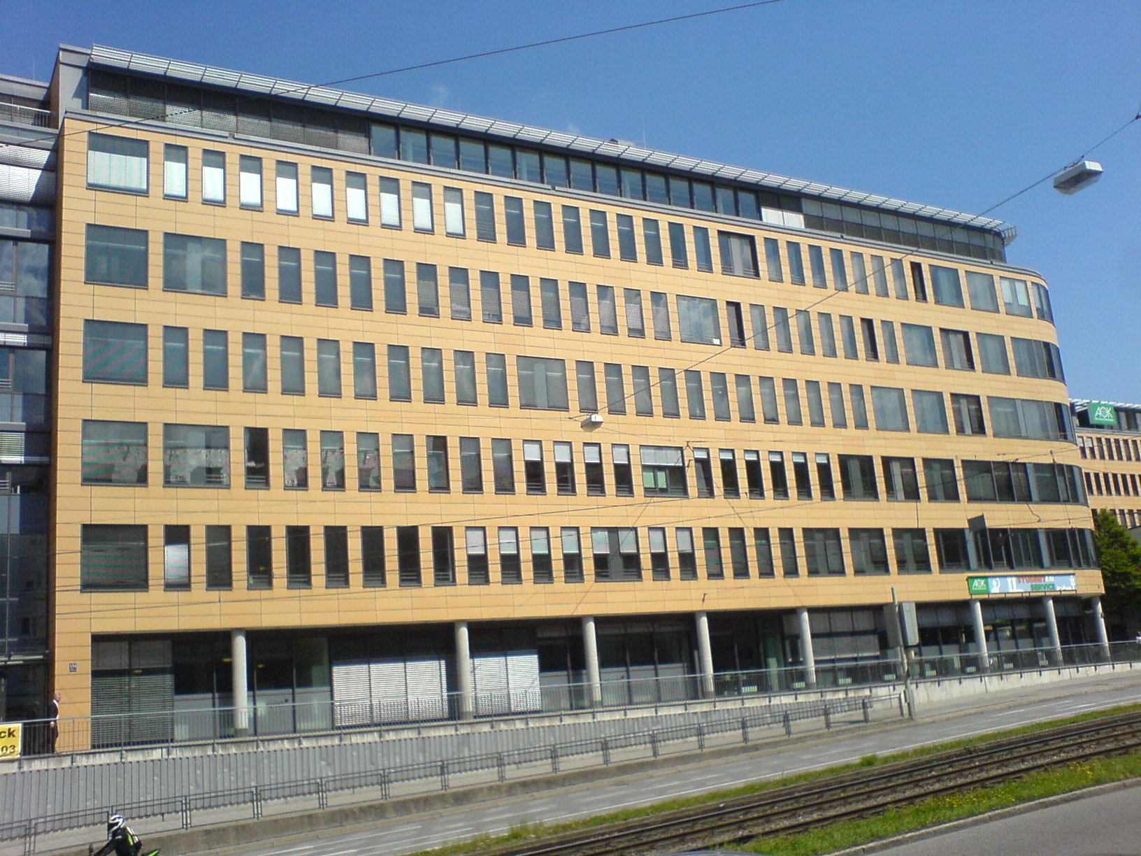 Munich, Landsberger Straße 150—152